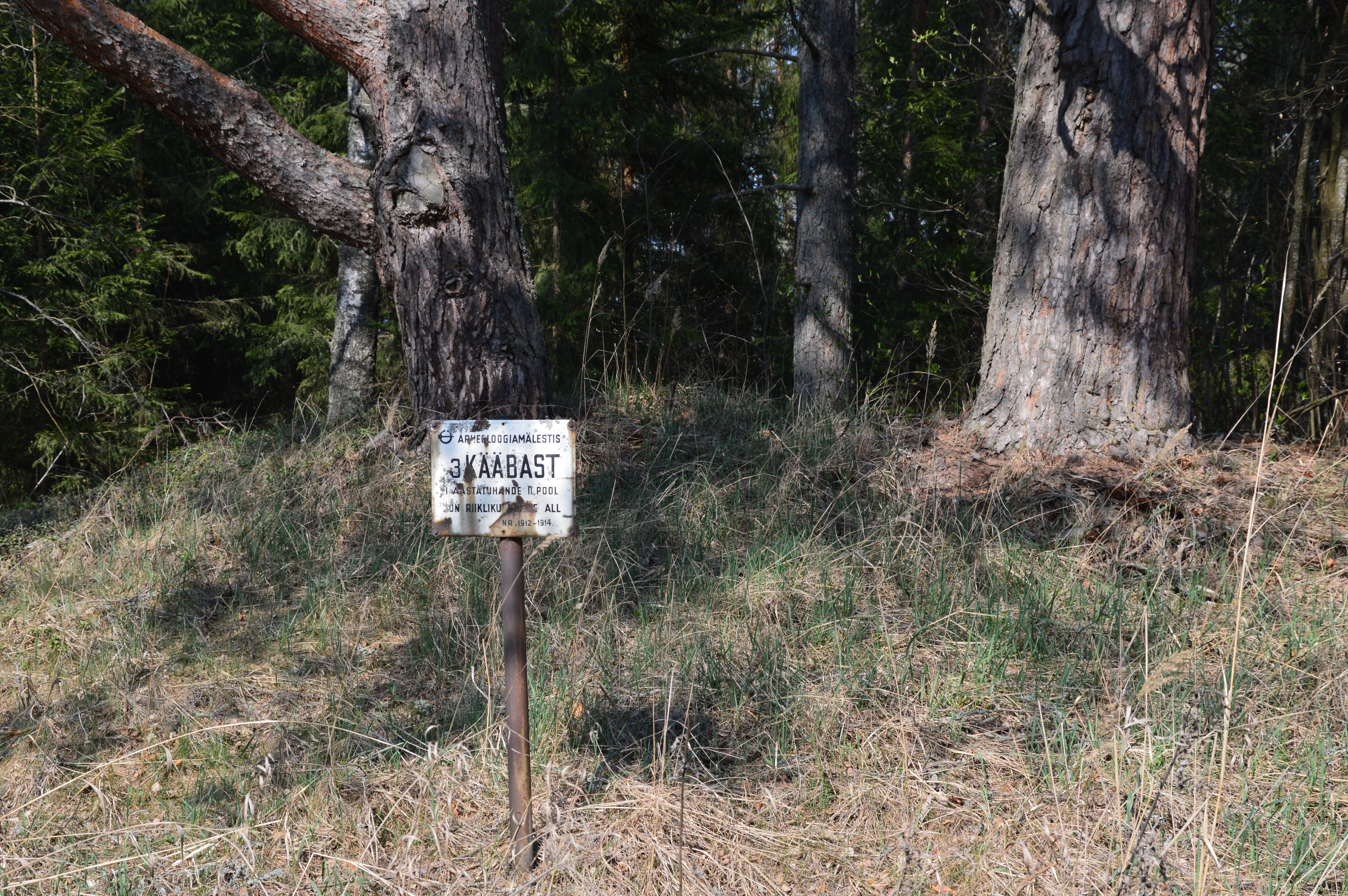 Matsi küla kääpad